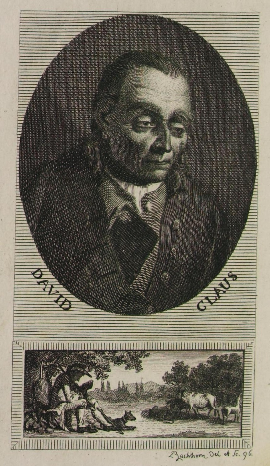 David Klaus, Illustration, 1796